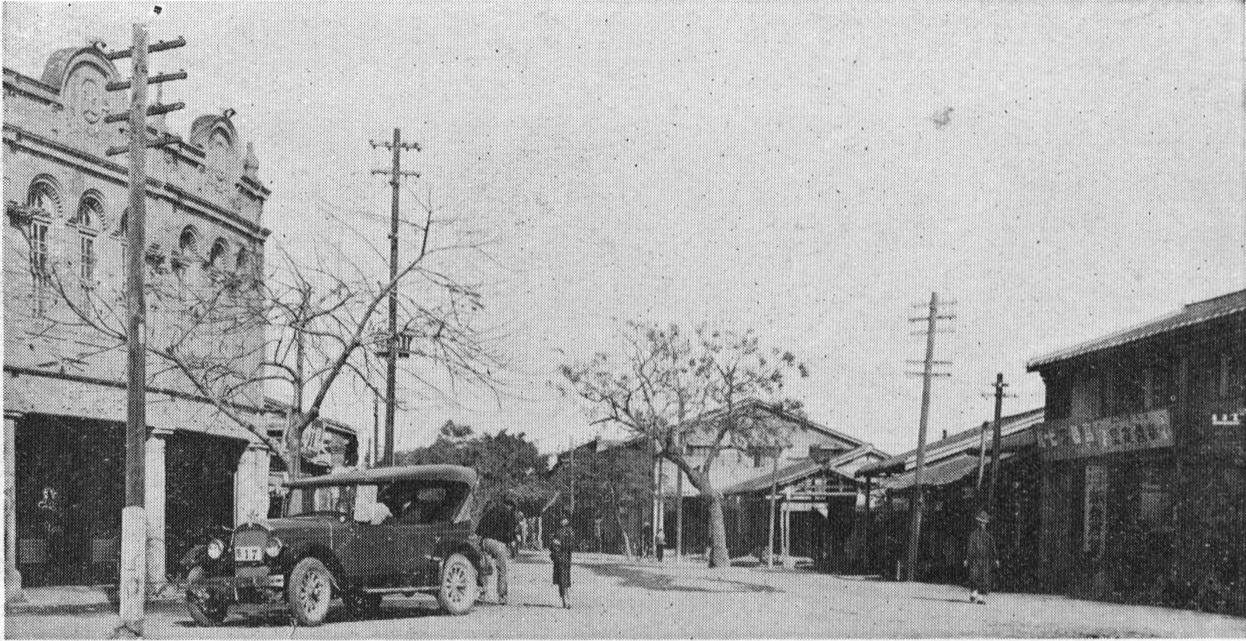 中文（台灣）: 作者：勝山吉作。新營庄。典藏者：中央研究院數位物件典藏者：中央研究院數位文化中心。公眾領域標章（Public Domain Mark）。發佈於《開放博物館》